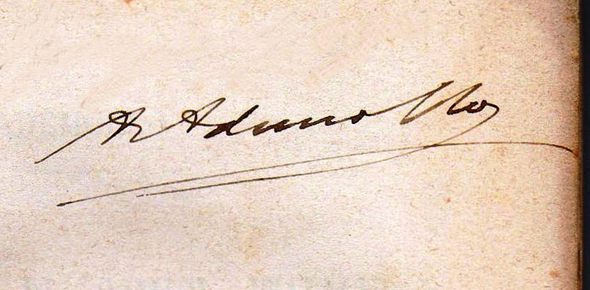 Autografo di Alessandro Ademollo apposto su una copia dell'opera Una famiglia di comici italiani nel secolo decimottavo (1885), copia di proprietà dell'utente.